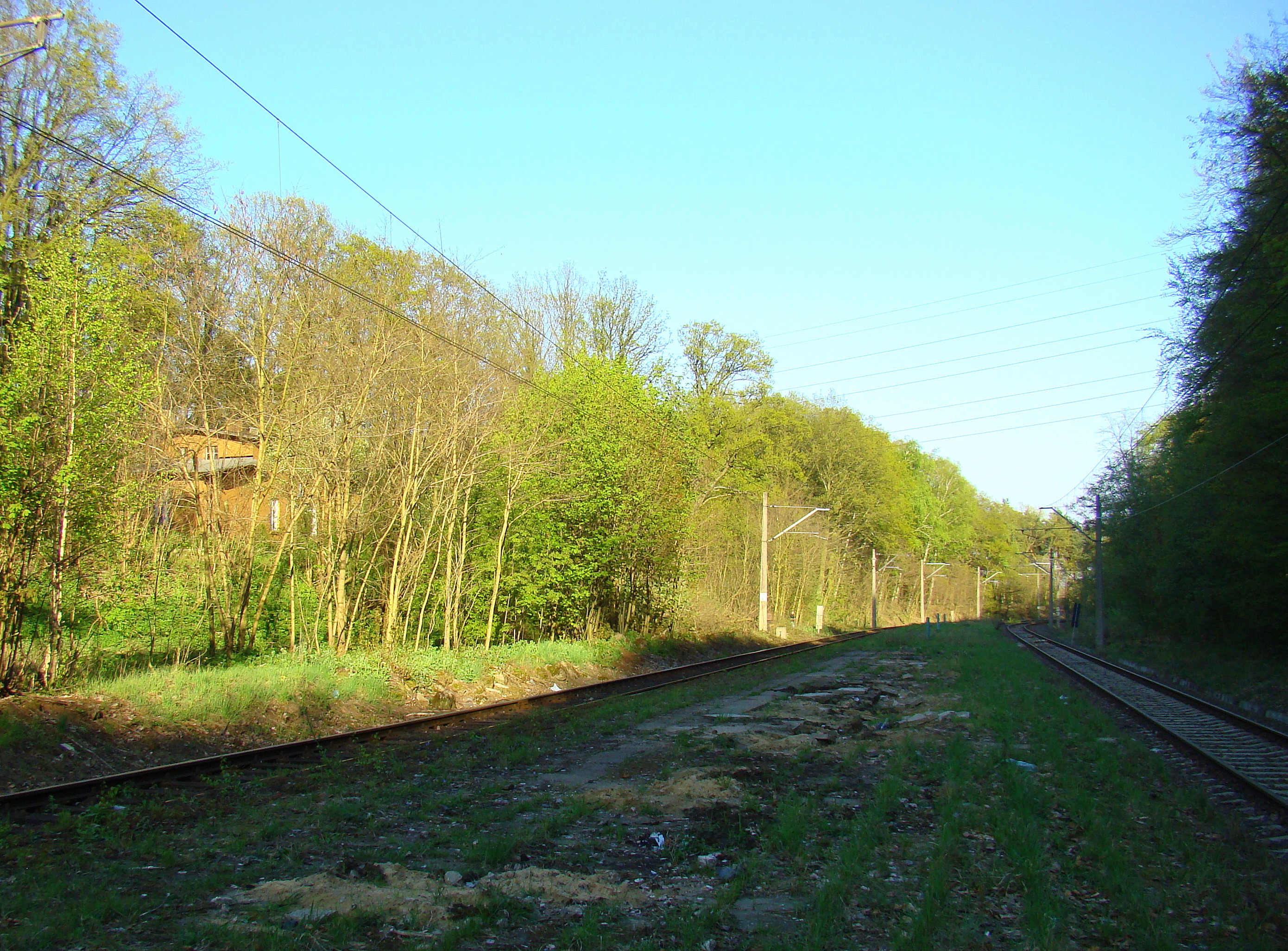 Szczecin Mścięcino, przystanek kolejowy (nieczynny), (Szczecin, Województwo zachodniopomorskie), Polska